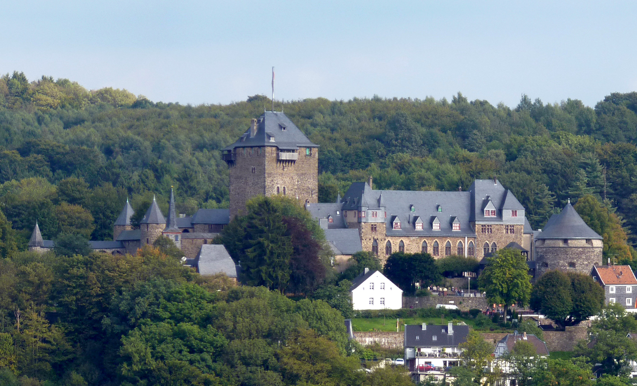 Schloss Burg in Solingen-Burg, Ansicht von Nordwesten This is a photograph of an architectural monument., no. 25